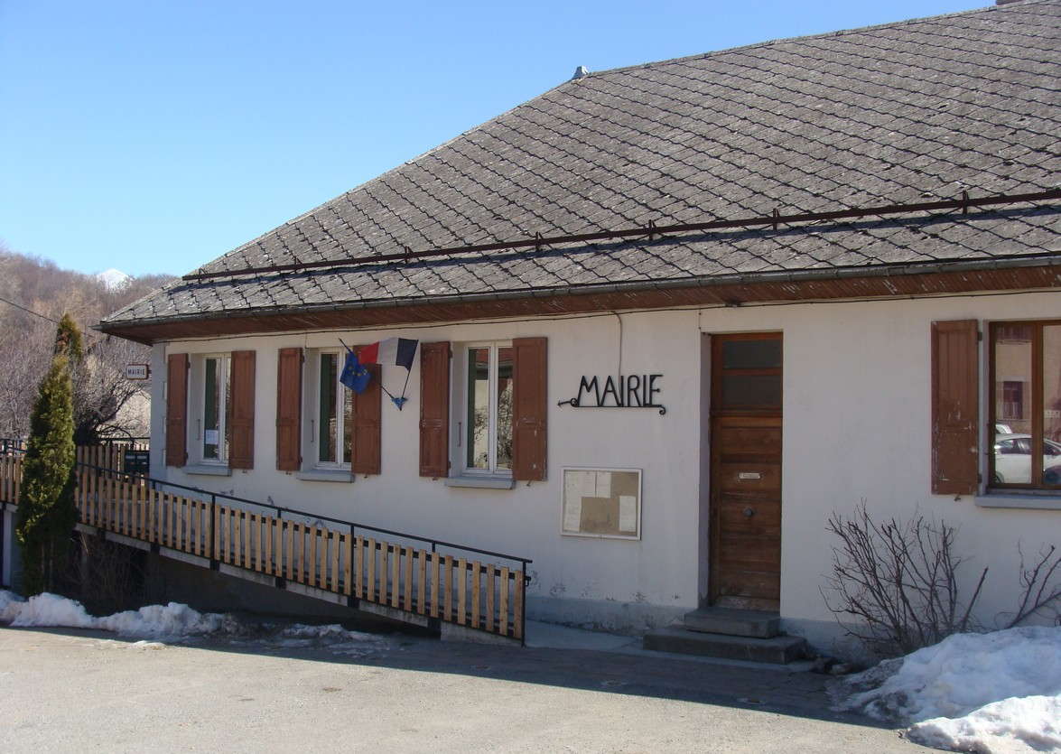 La (modeste) mairie de Saint-Julien-en-Champsaur.